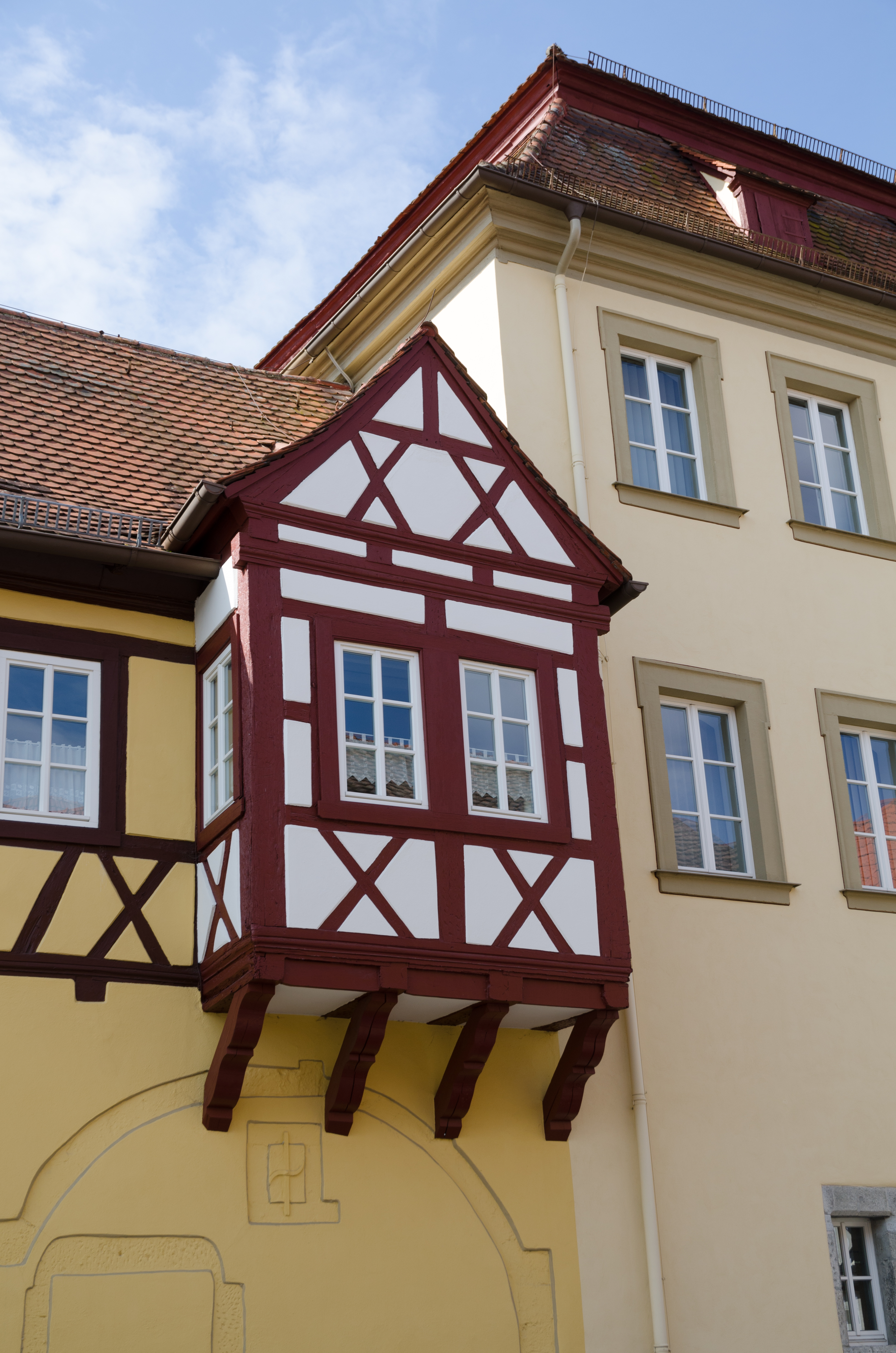 Münnerstadt, Landgerichtsgasse 1, Ostseite